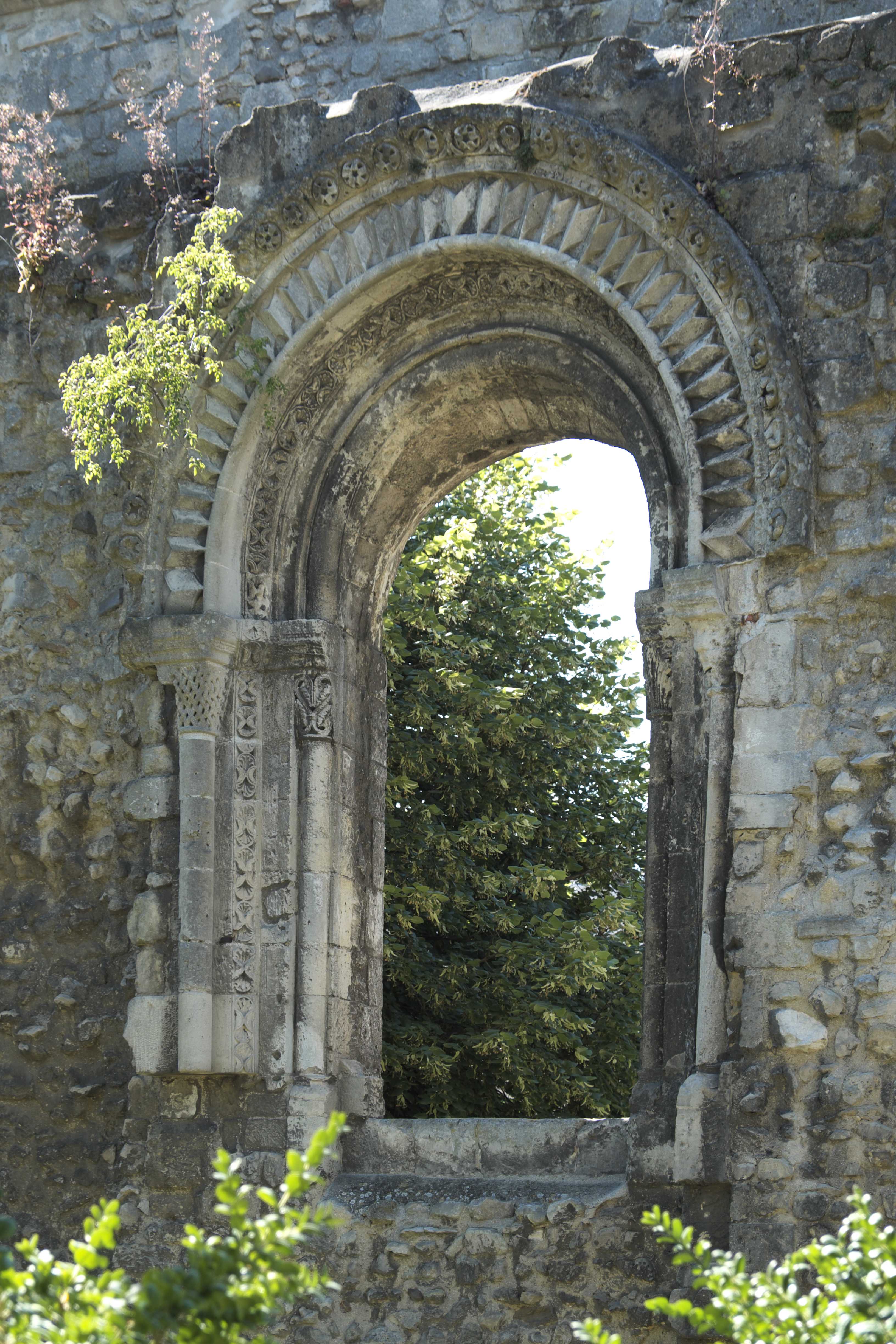 Ehemalige Abtei Notre-Dame in Soissons im Département Aisne (Picardie/Frankreich), romanisches Fenster